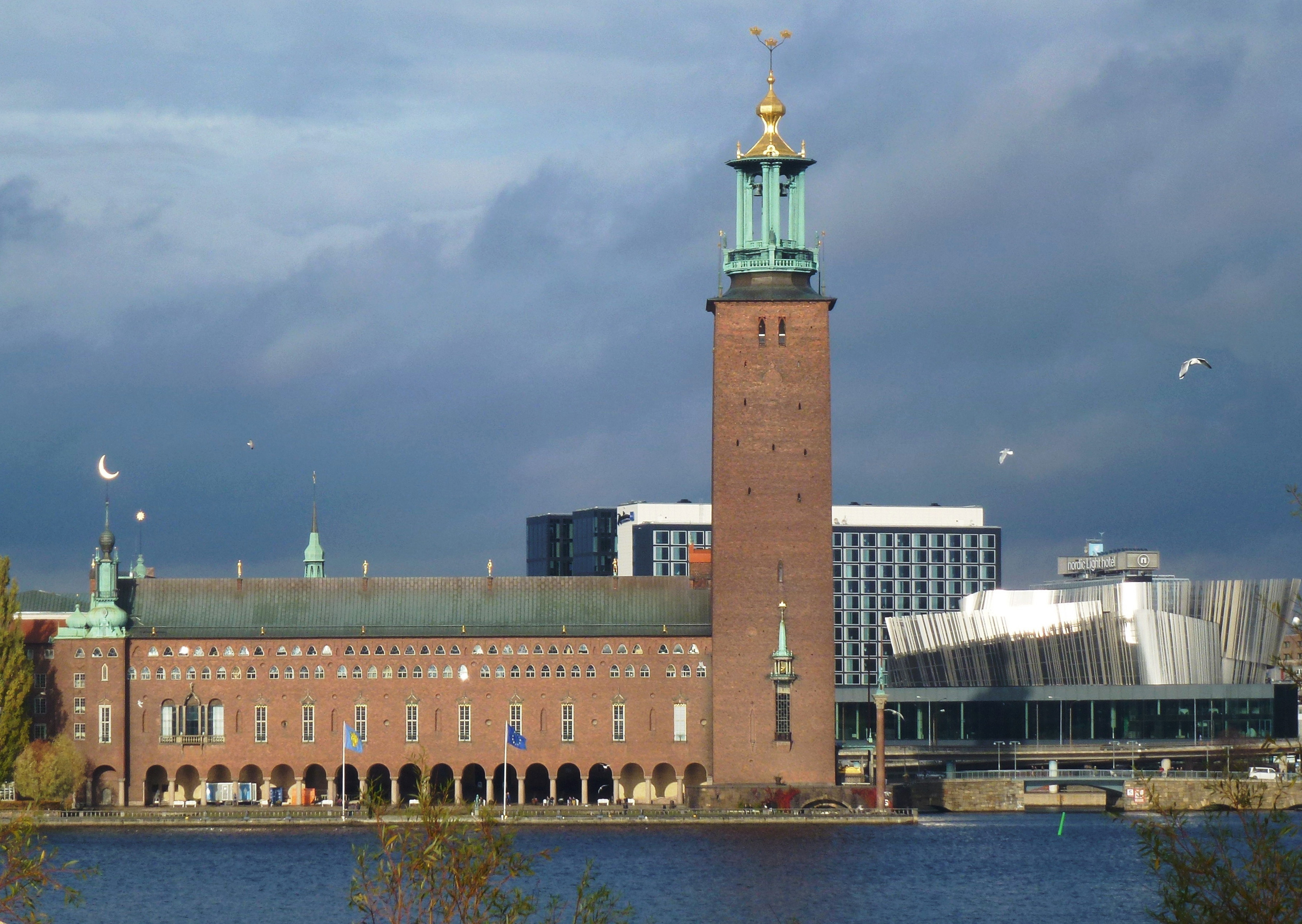 Stockholms stadshus, fasad mot syd